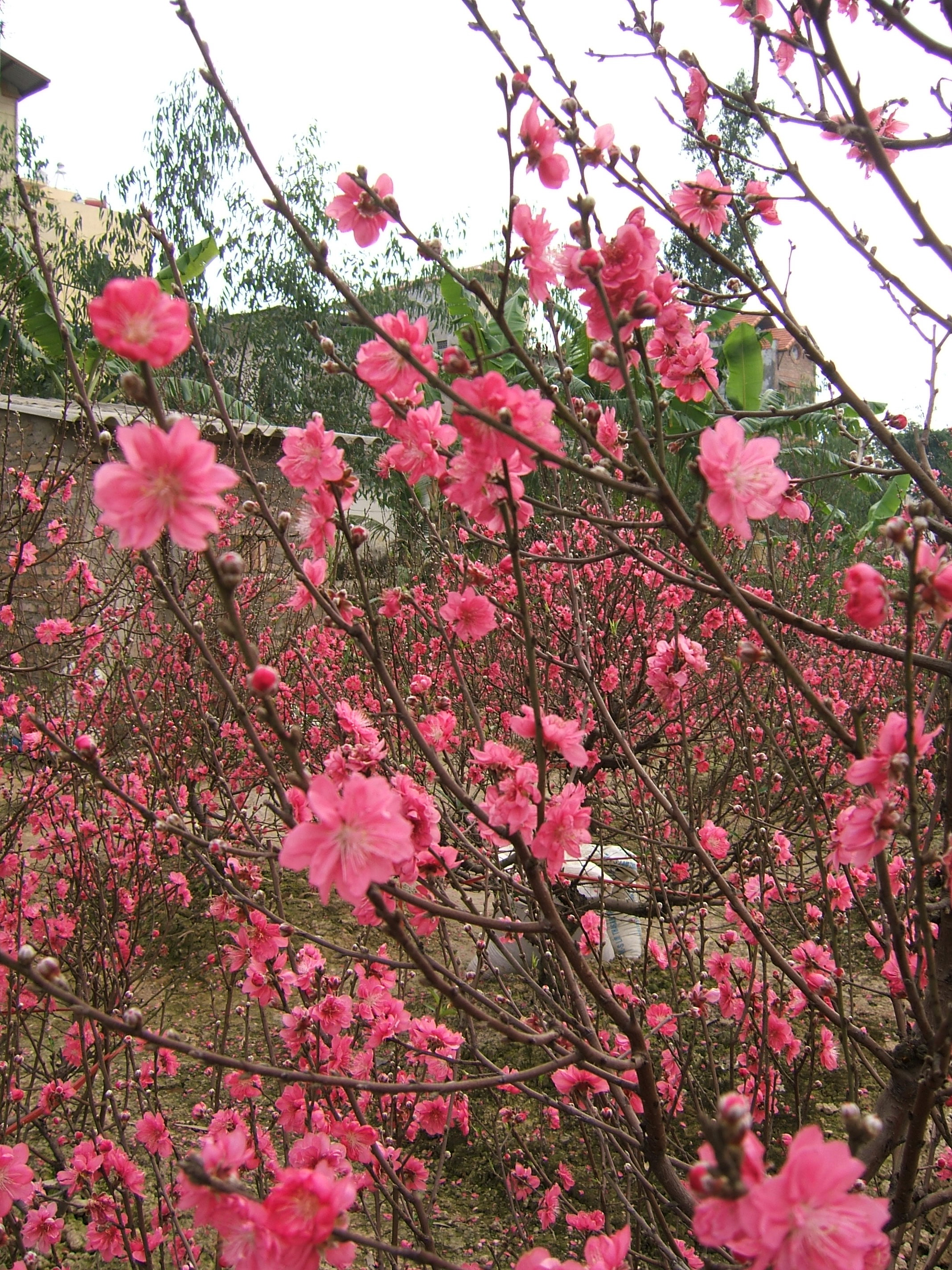 Prunus persica (hoa đào) in Nhật Tân, Hanoi, Vietnam